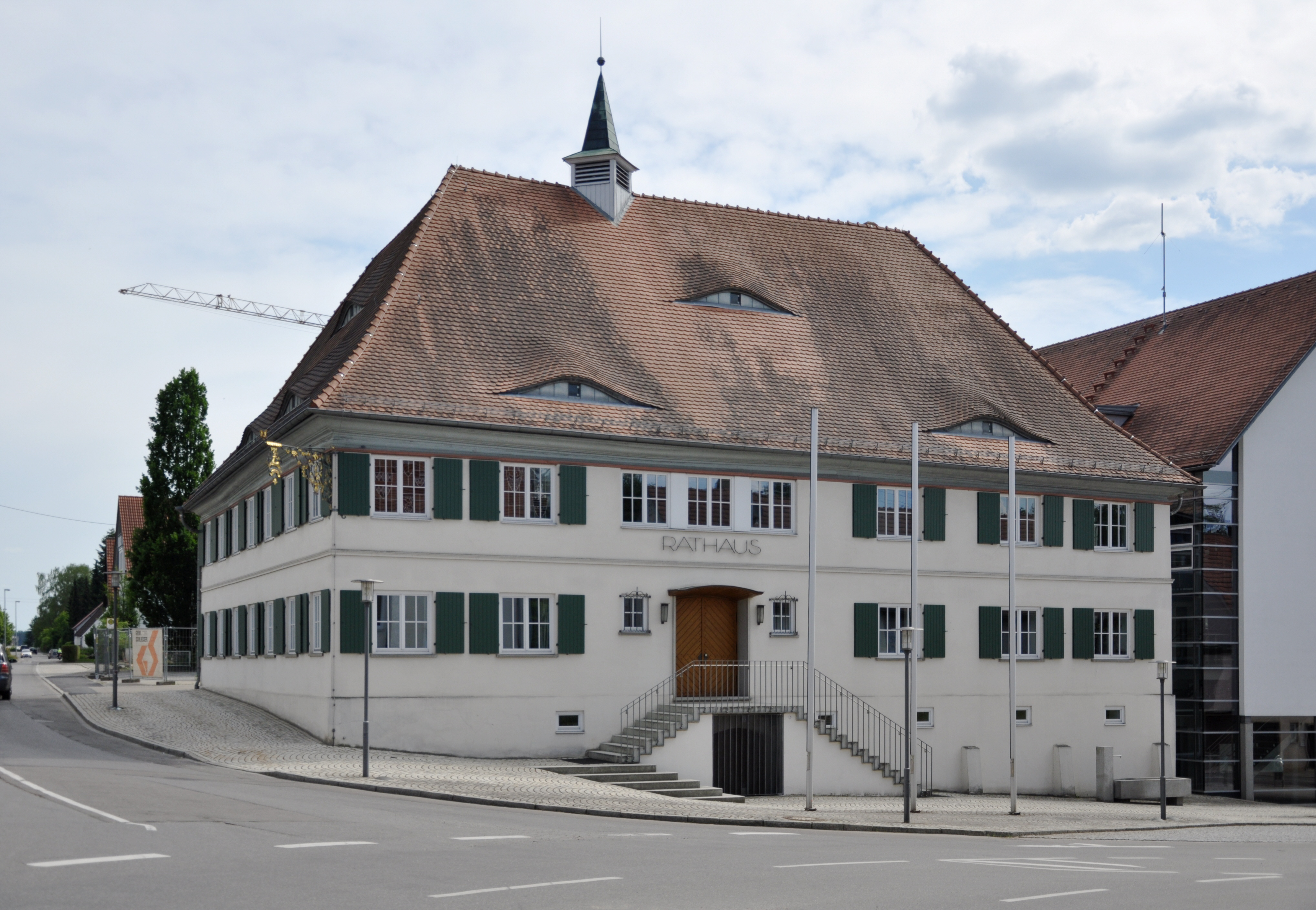 Schwendi, Landkreis Biberach, Rathaus, ehemals Gasthof Hirschen